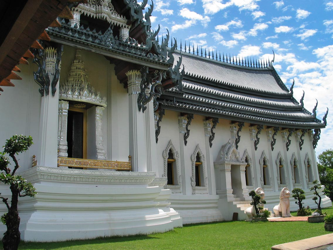 Sanphet Prasat Palace, 3/4 size model of the royal palace at Ayutthaya in Muang Boraan (Ancient City), Bangkok